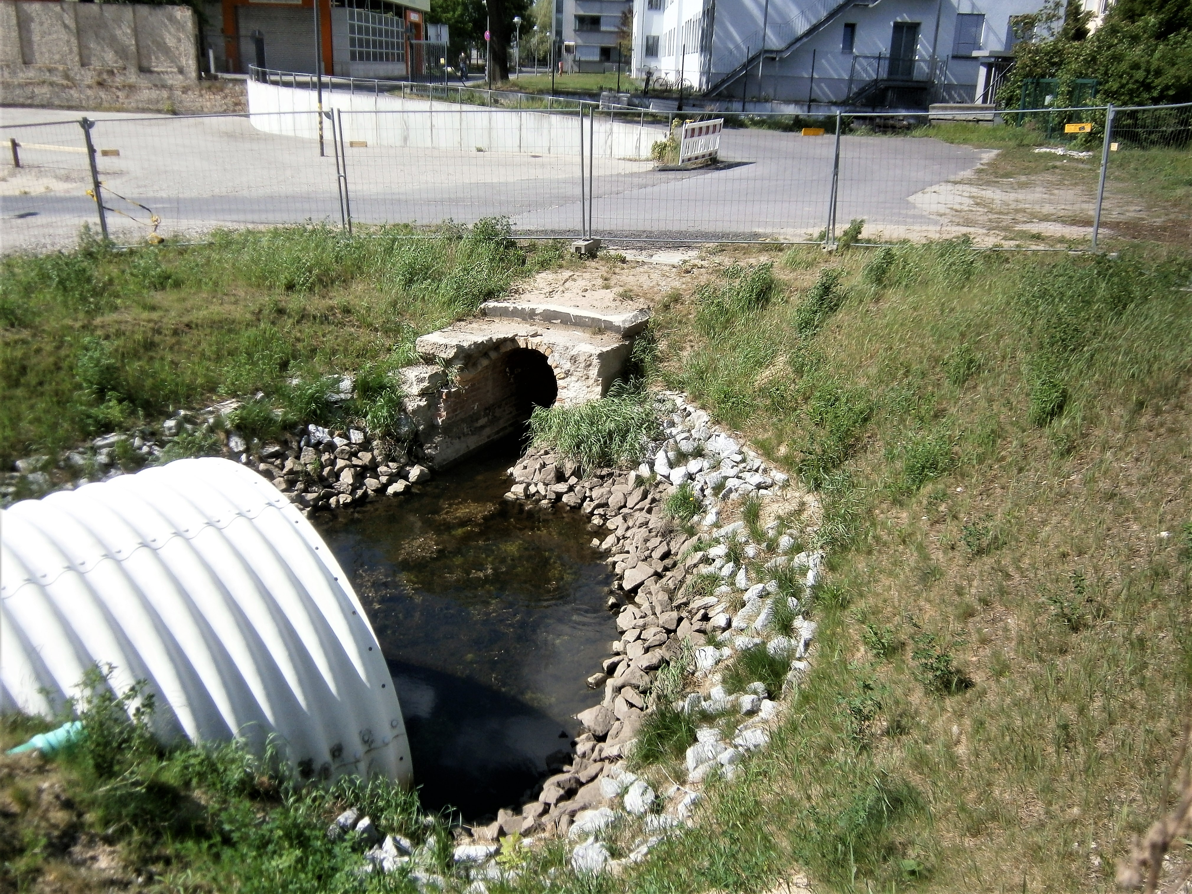 Die Südpanke folgt dem Ur-Lauf der Panke wurde aber in der Innenstadt - besonders durch die Berliner Maure - benachteiligt in den 2010er Jahren wurde ein Lauf reaktiviert, der Wasserzulauf zum (Süd-)Pankepark ist zeitweise "behindert".